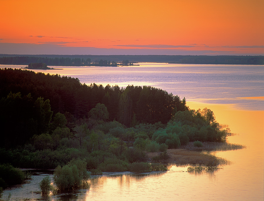 Дарвинский заповедник. Вечер на Рыбинском море